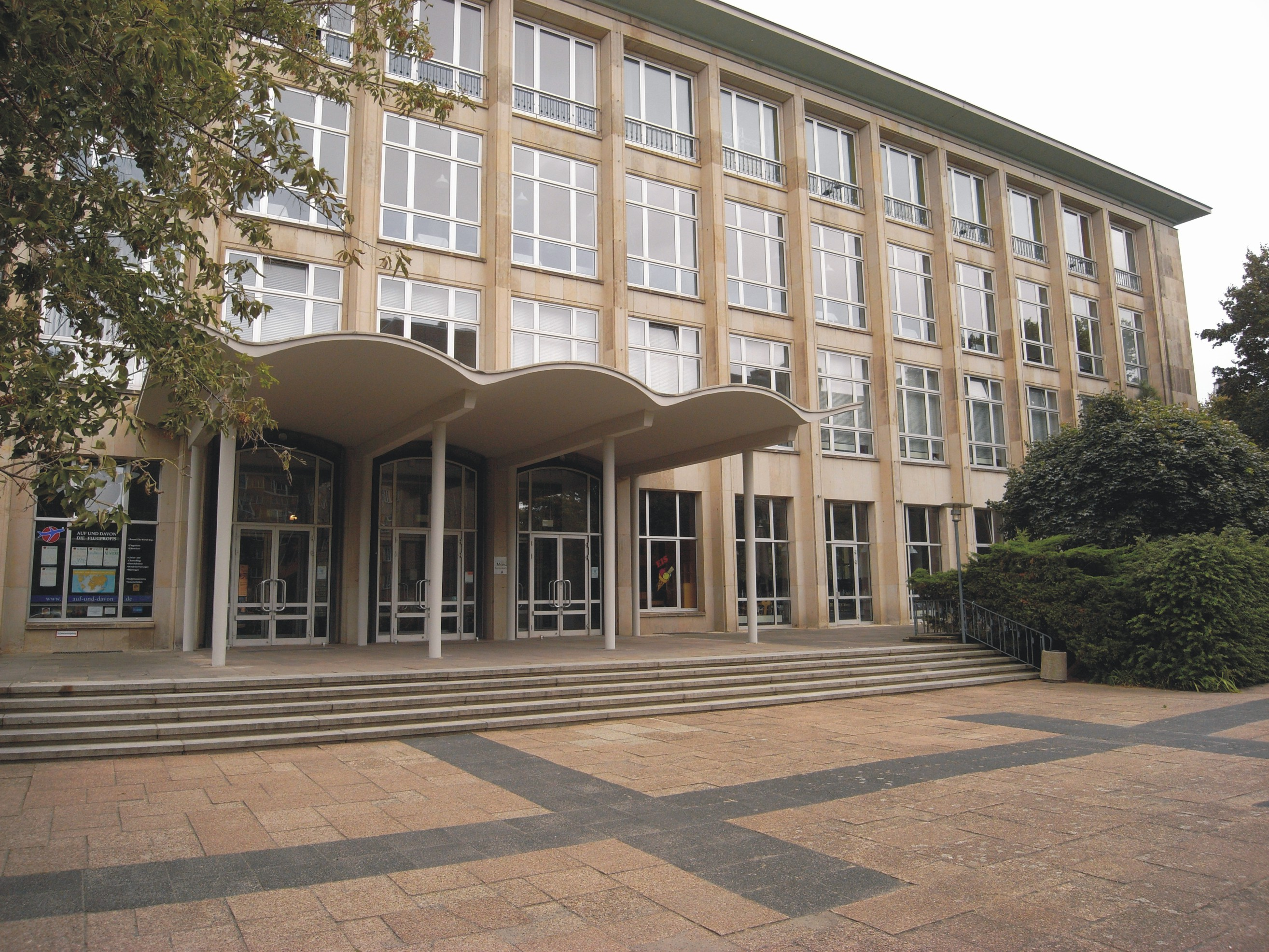 Mensa Reichenbachstraßein Dresden. Mensagebäude der ehemaligen Hochschule für Verkehrswesen „Friedrich List“. Heute Mensa der Hochschule für Technik und Wirtschaft.